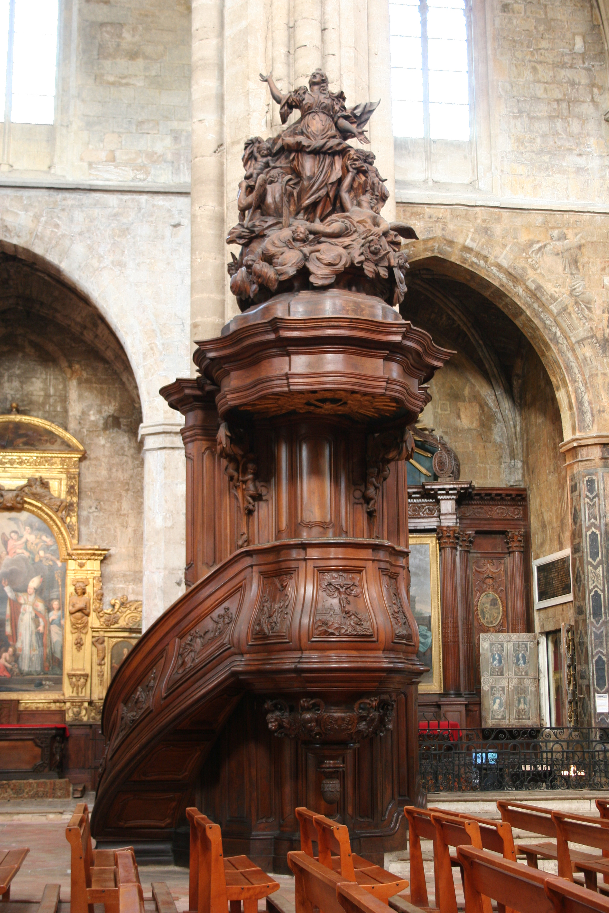 Saint-Maximin-la-Sainte-Baume (Var, France), chaire à prêcher réalisée par le dominicain Louis Gudet dans la basilique Ste Marie-Madeleine.